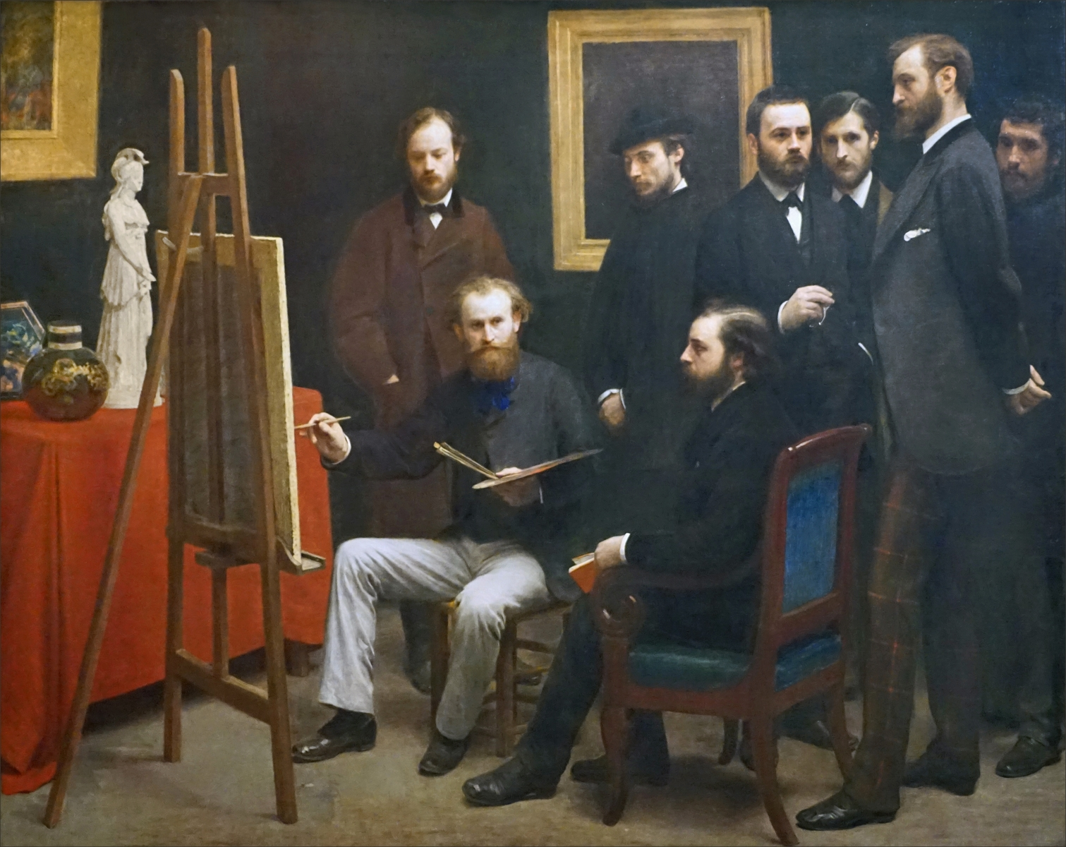 Un atelier aux Batignolles 1870 Oeuvre d'Henri Fantin-Latour huile sur toile musée d'Orsay, Paris, France Achat 1892 Toile de l'artiste présentée dans l'exposition rétrospective du musée du Luxembourg de gauche à droite : Assis : Édouard Manet (peintre), Zacharie Astruc Debout : Otto Scholderer, Auguste Renoir, Émile Zola, Edmond Maître, Frédéric Bazille, Claude Monet Site de l'exposition au musée du Luxembourg (Paris)